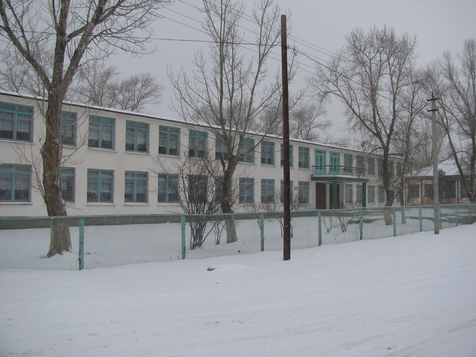 МОУ"Нижнедобринская СОШ"